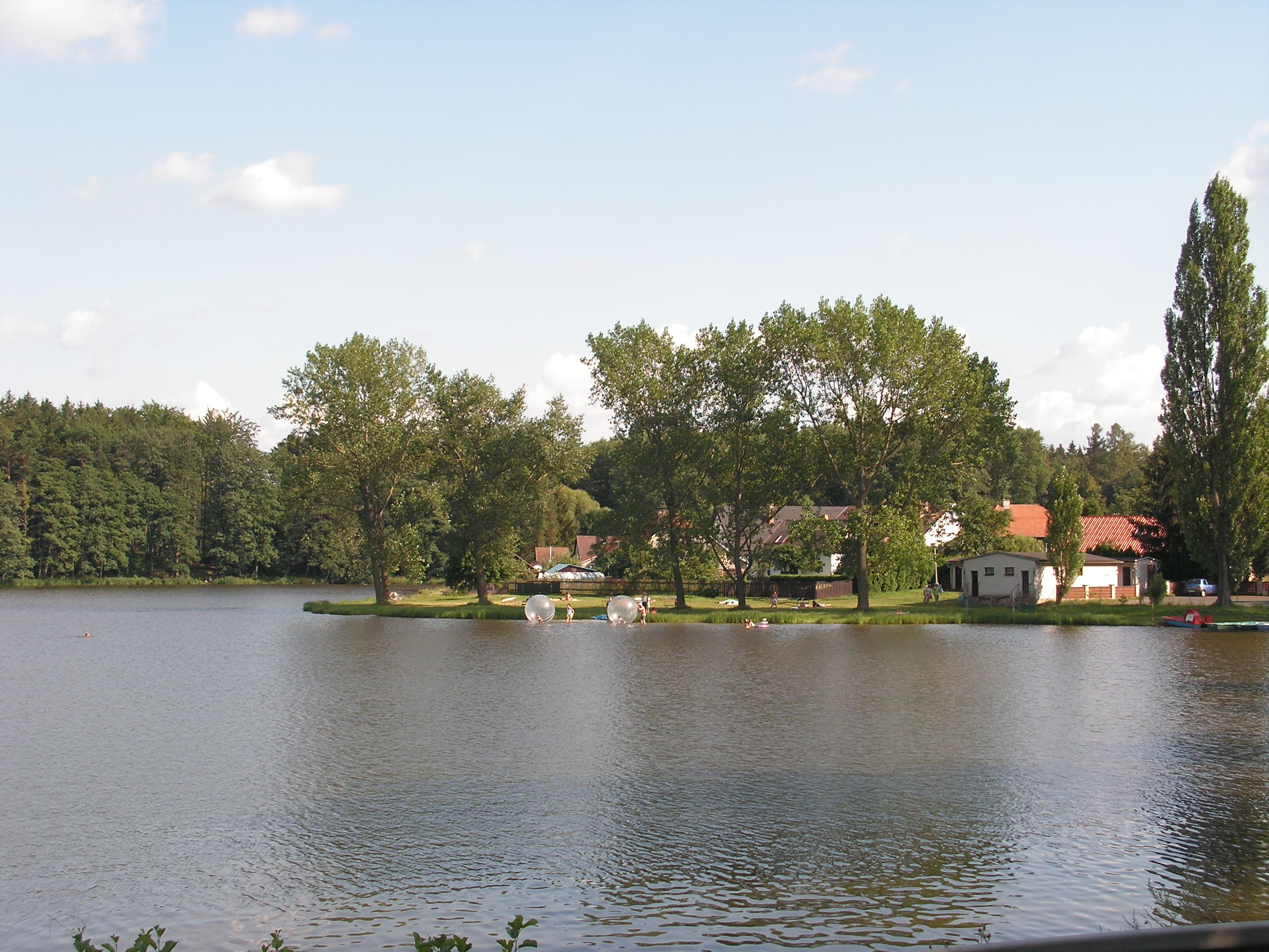 Zbýšovský rybník v okrese Kutná Hora.